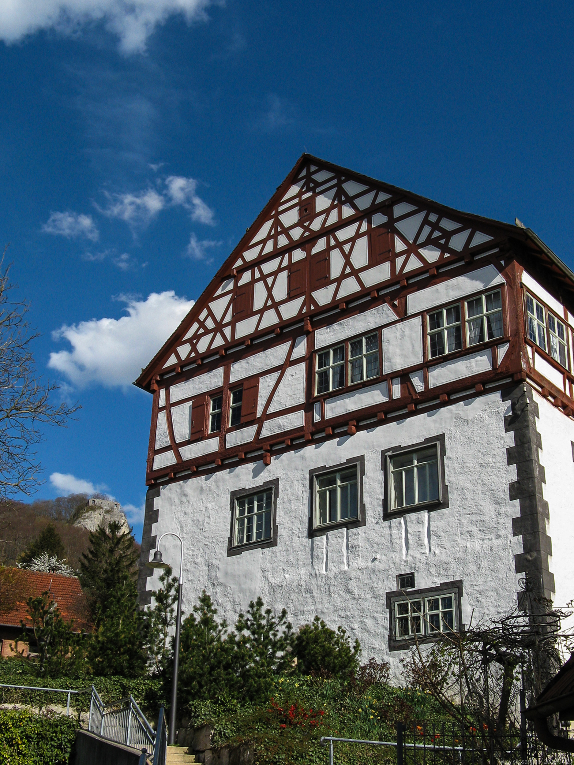 Das Heubacher Schloss vor dem Rosenstein.